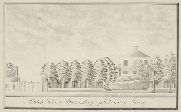 Pałac w Przeworsku, 1801-1820